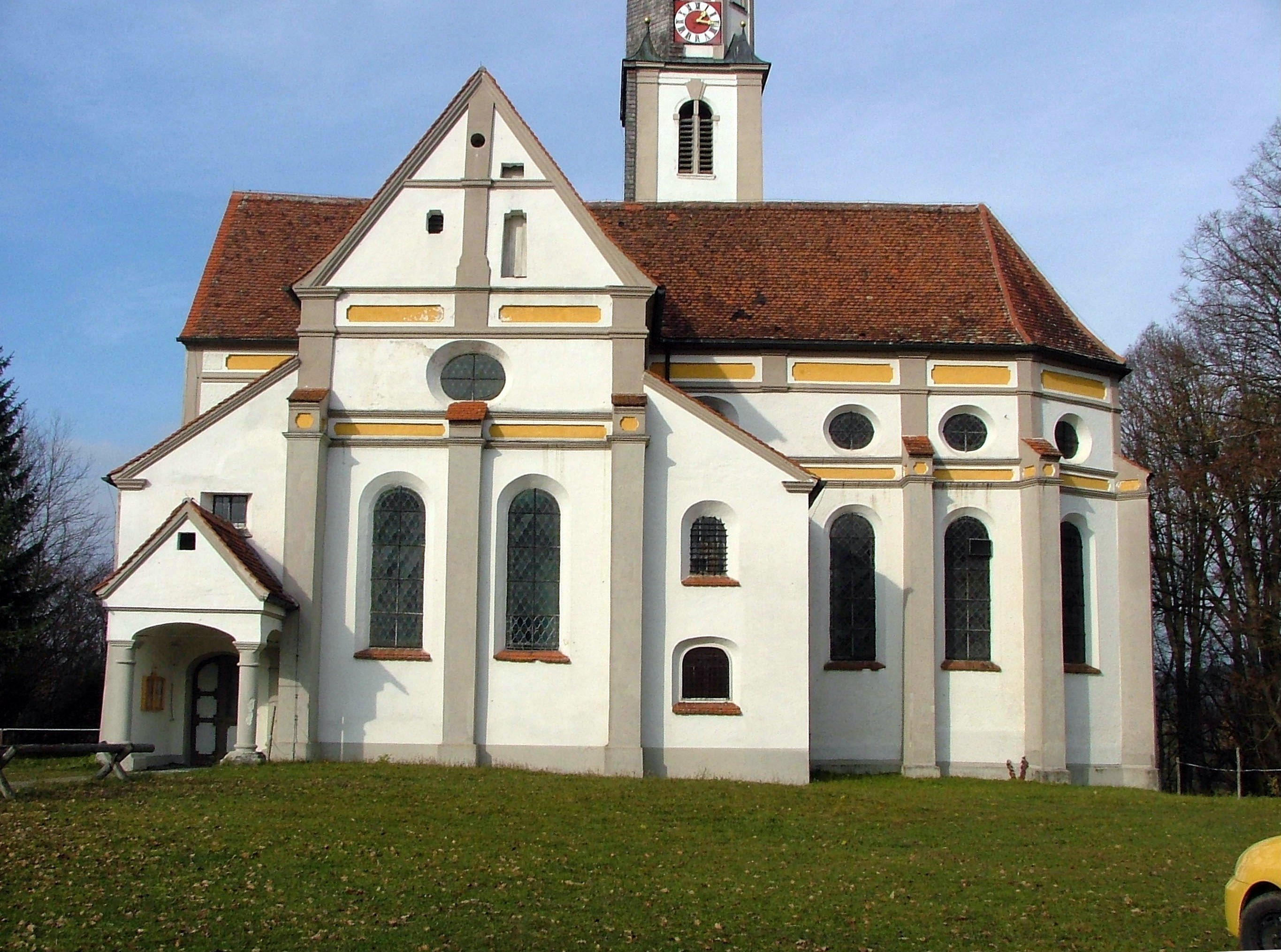 Hörmannshofen (Gde. Biessenhofen), Filial- und Wallfahrtskirche St. Ottilia auf dem Ottilienberg.